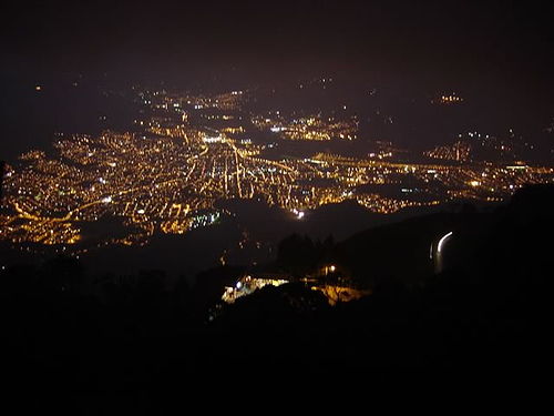 Bello en la nocheBello es bello de noche